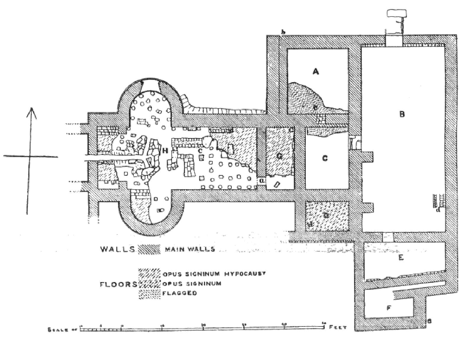 Befundplan der römischen Therme von Great-Chesters, Hadrianswall (GB), Zeichnung von 1897.